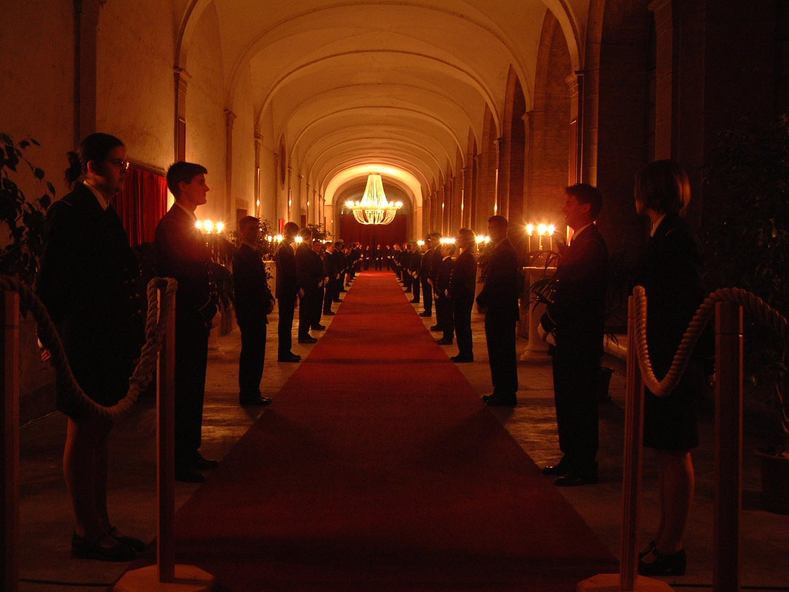 Haie d'honneur des élèves pendant le Grand Gala de Cluny.